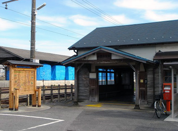 美濃赤坂駅(岐阜県、JR東海) 撮影：投稿者(Monami)、撮影日：2005年